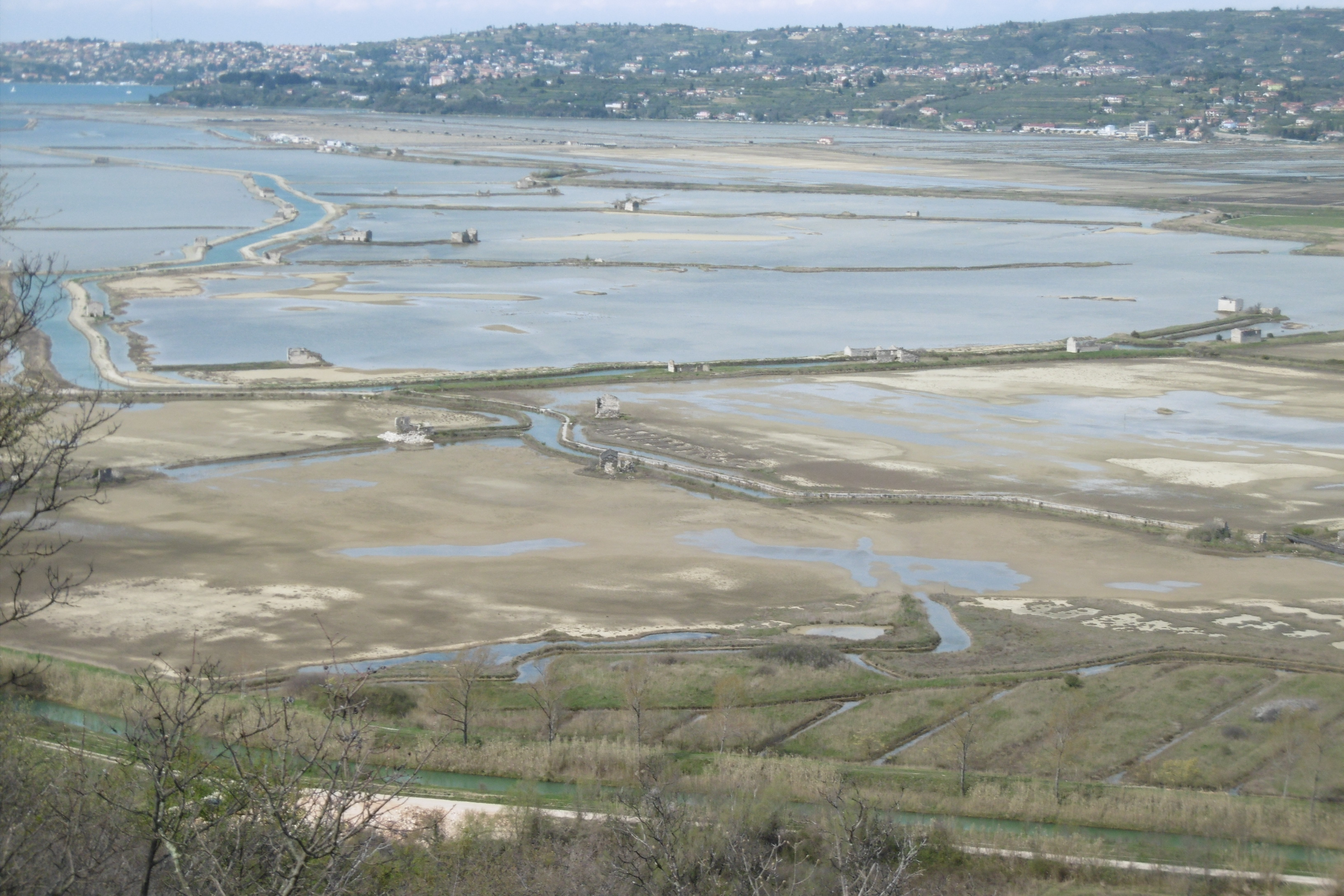 Saline di Sečovlje/Sicciole